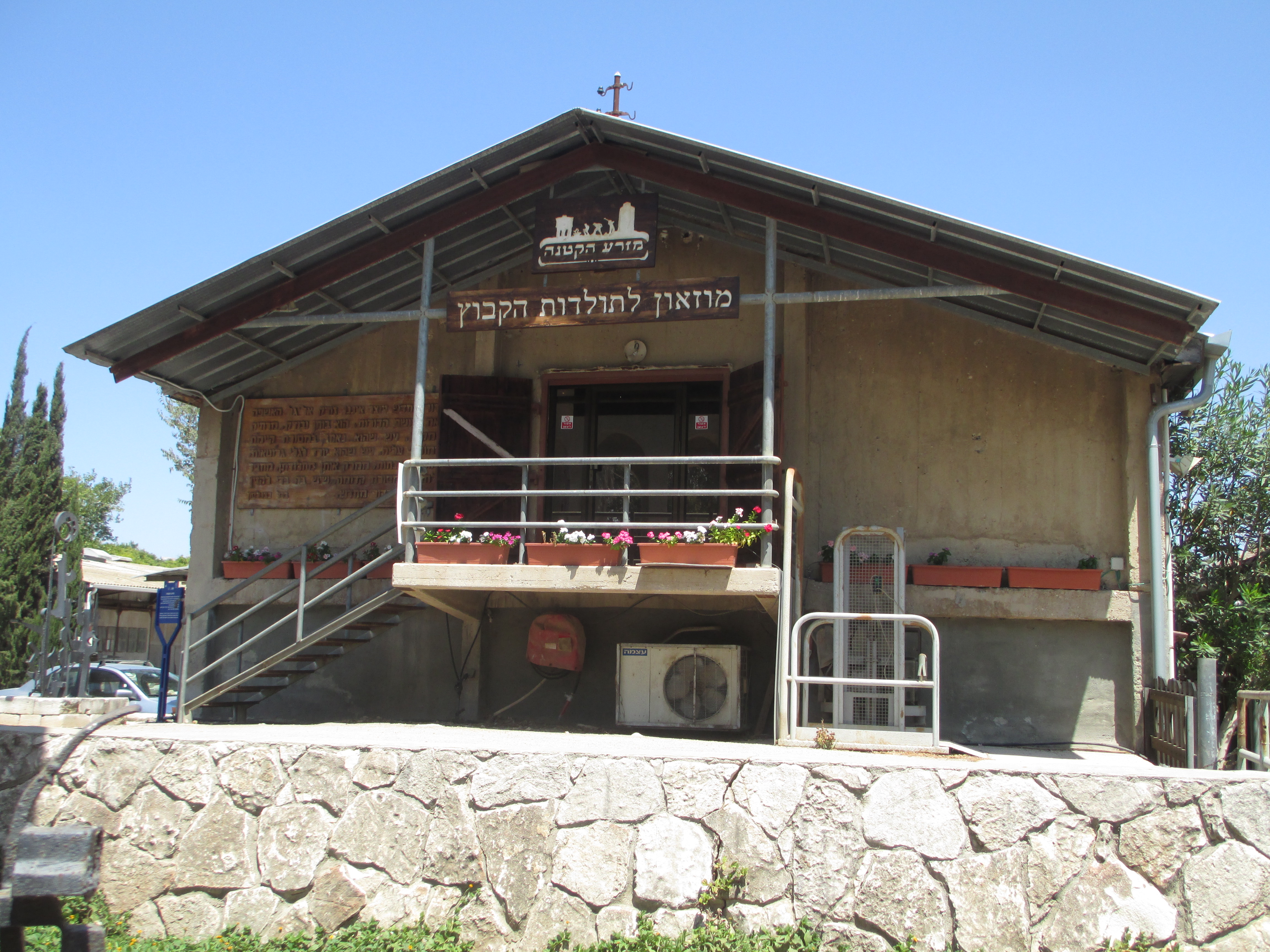 מוזיאון מזרע הקטנה במזרע